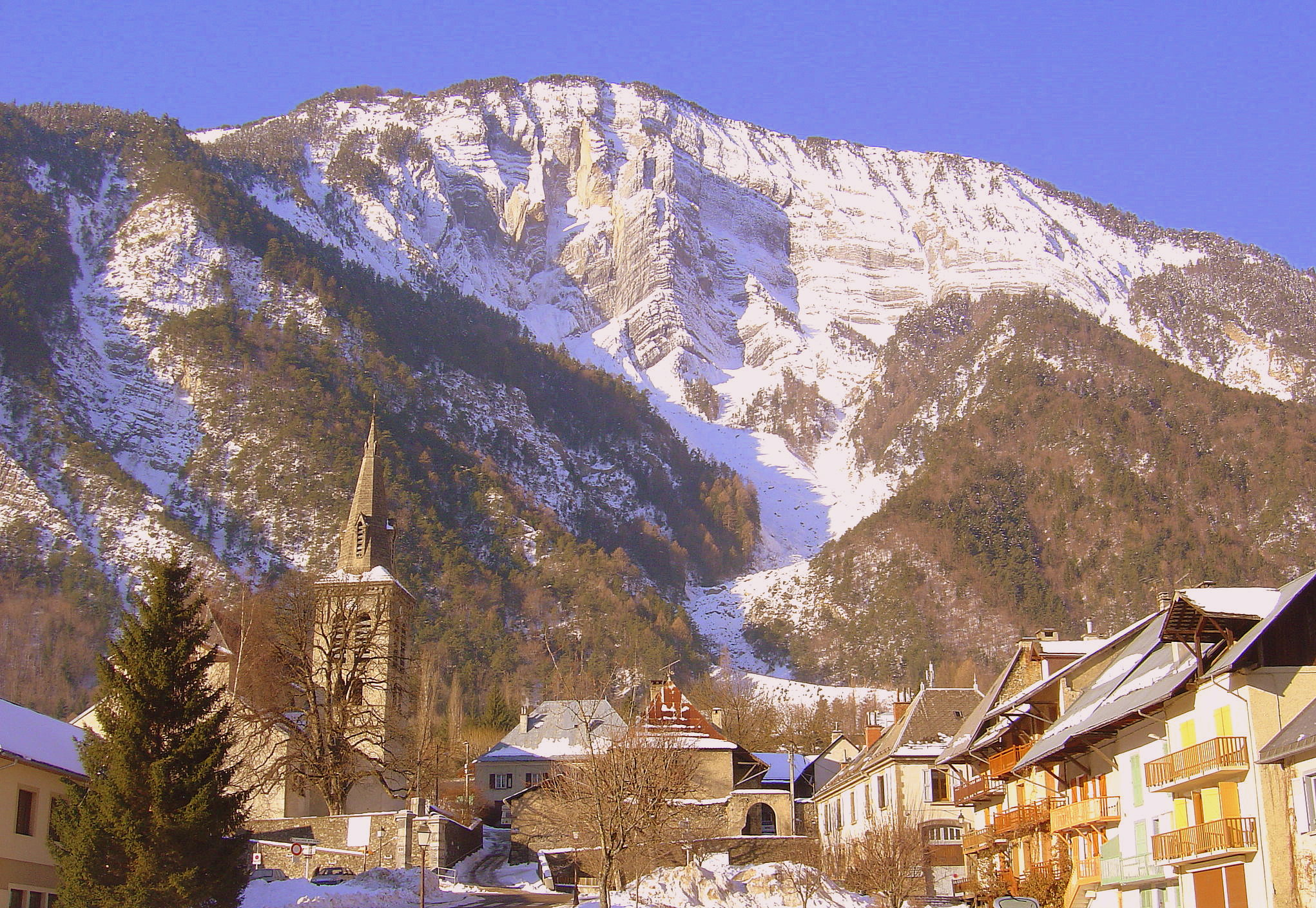 Bourg d'Oisans, l'église et le prégentil